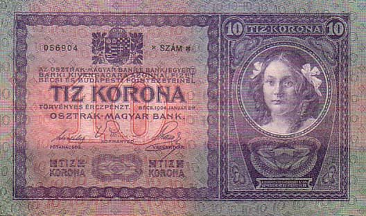 10 Austro-Hungarian Krone/korona (1904) - reverse